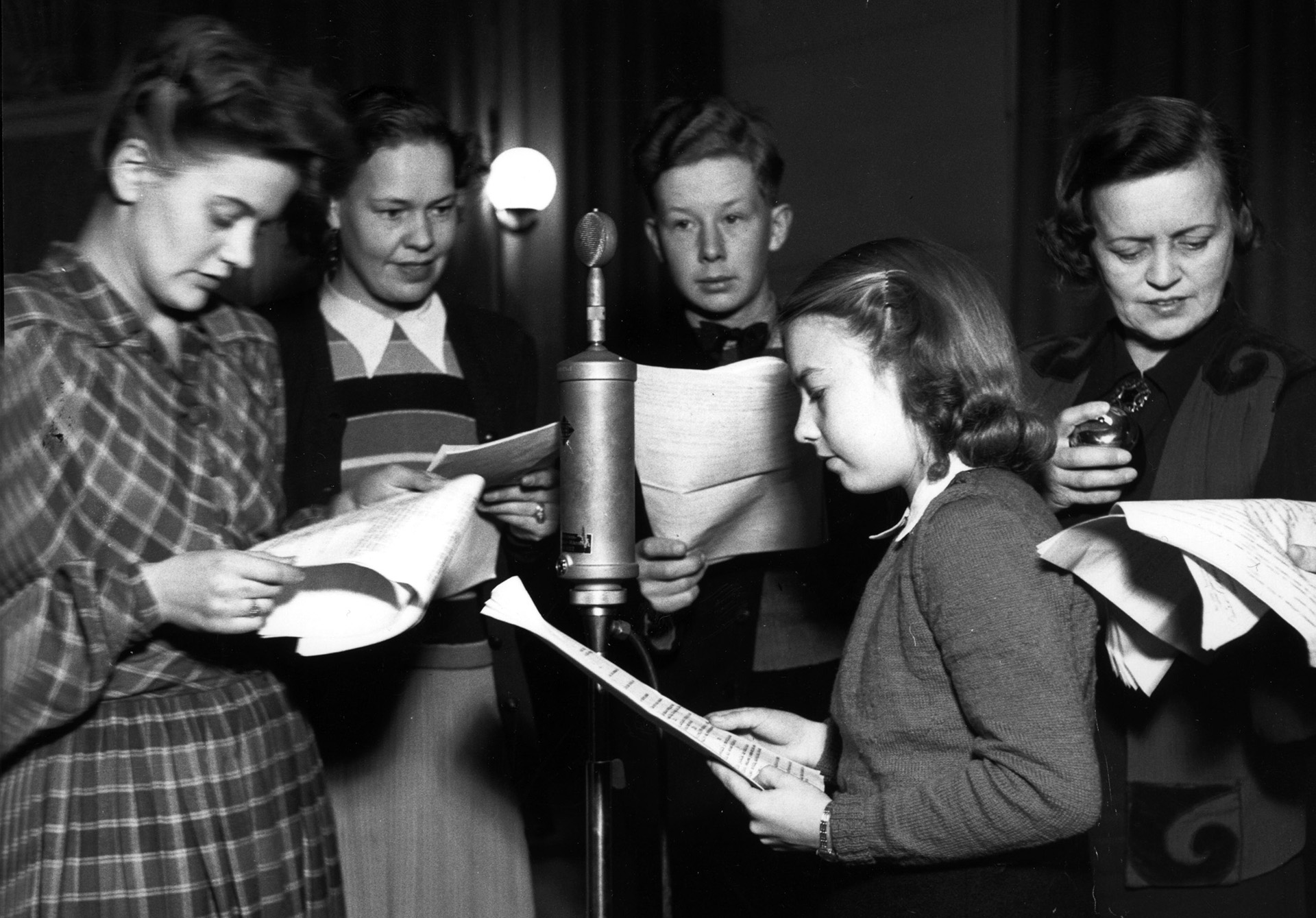 Suomisen perhe -kuunnelmaa esitetään vuonna 1946. Rooleissa mm. Elsa Turakainen, Lasse Pöysti, Liisa Nevalainen, Maire Suvanto.